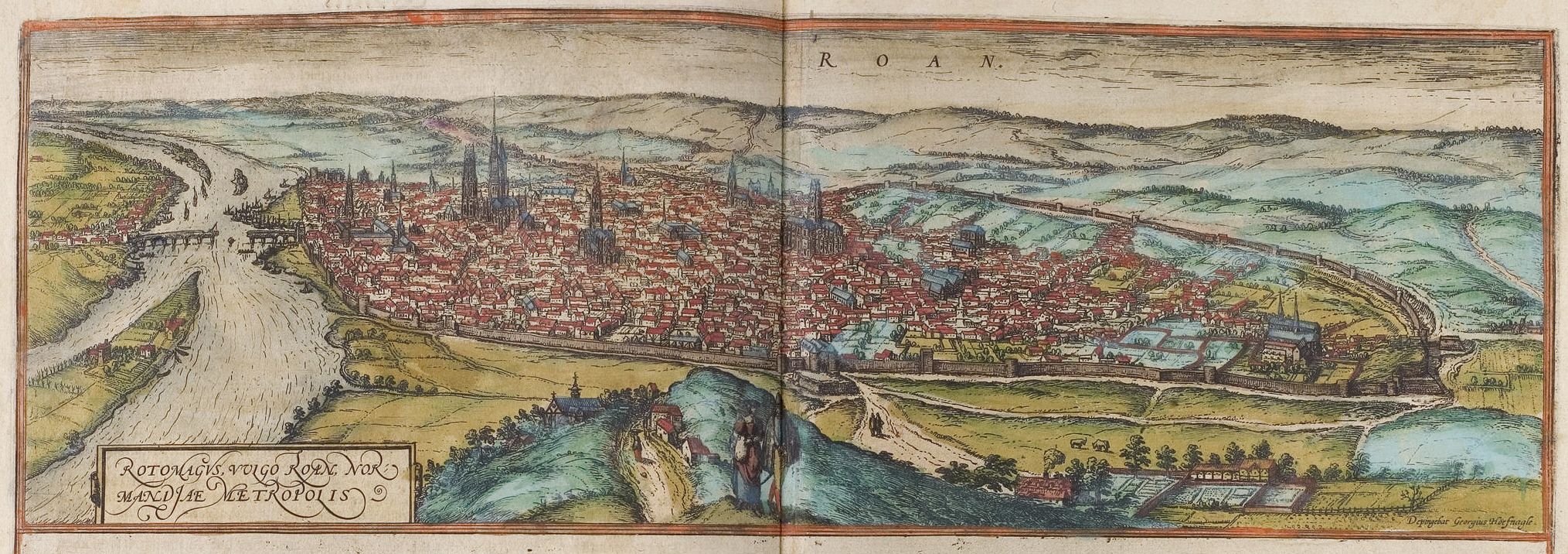 Rouen